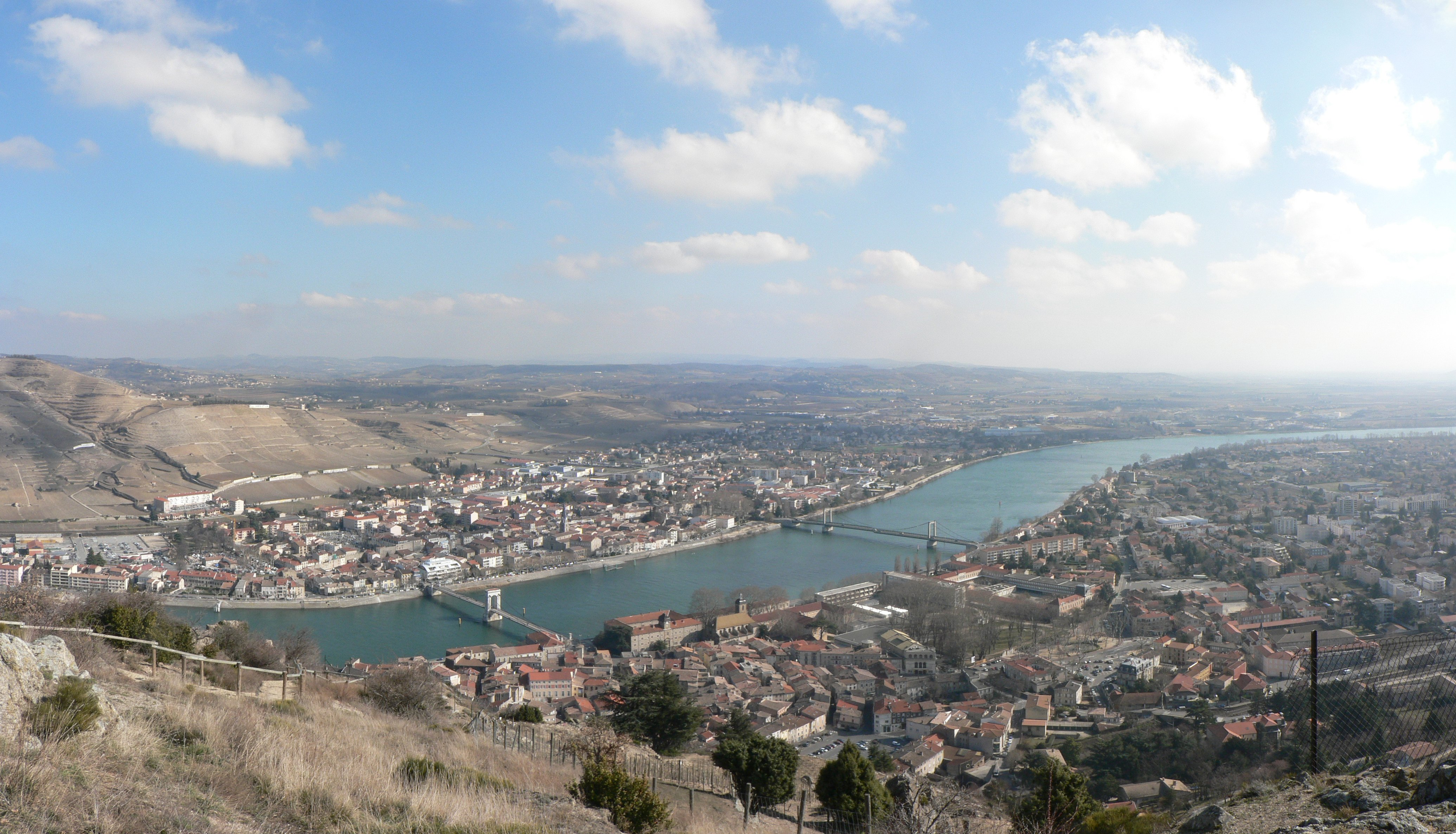 Vue depuis les hauteurs de Tournon-sur-Rhône : Tournon, le Rhône, puis Tain-l'Hermitage sur l'autre rive